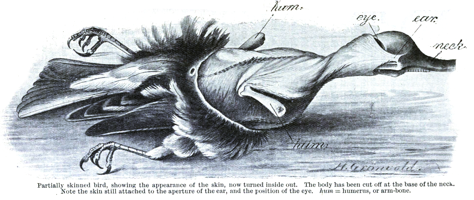 partly skinned bird